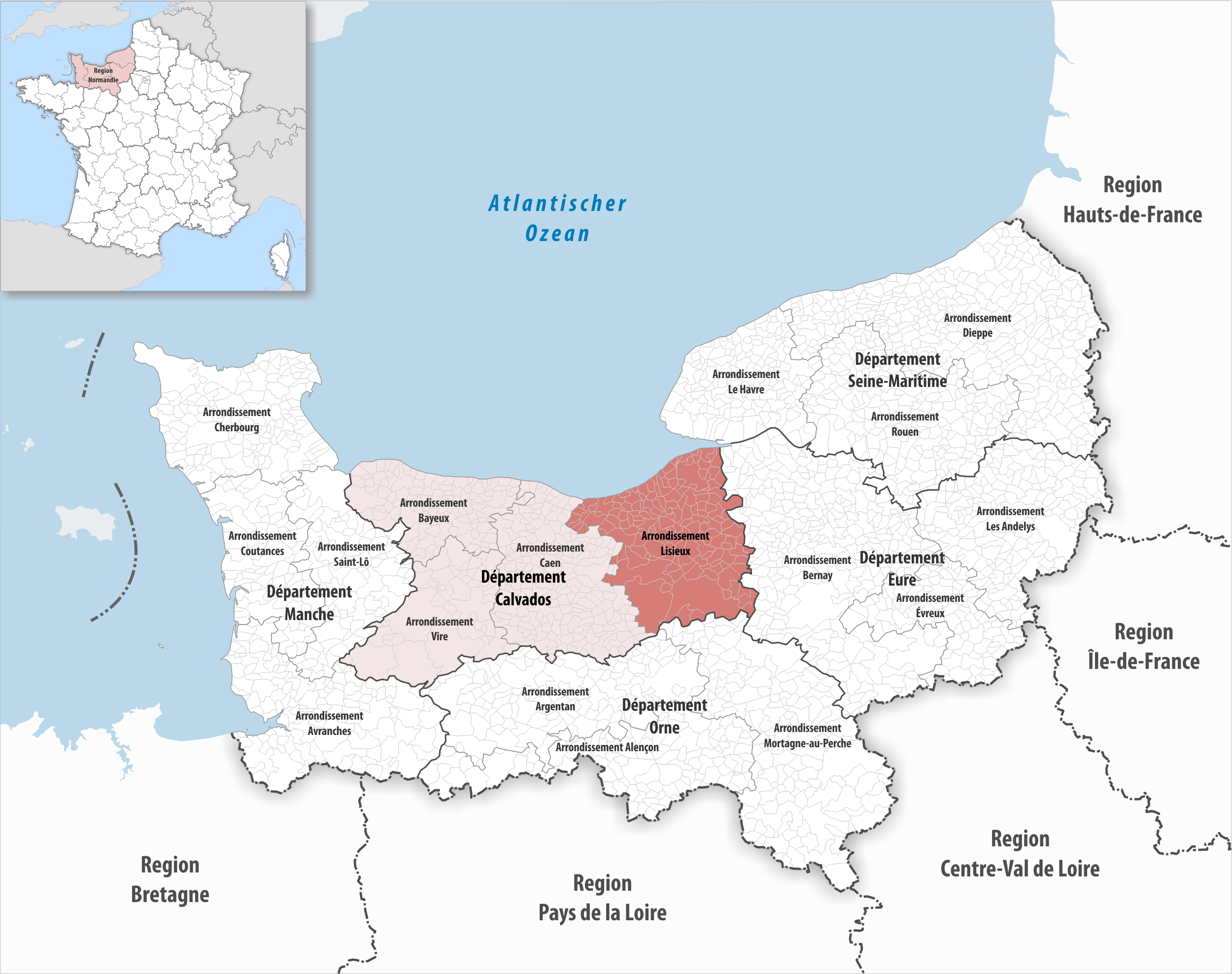 Lage des Arrondissements Lisieux